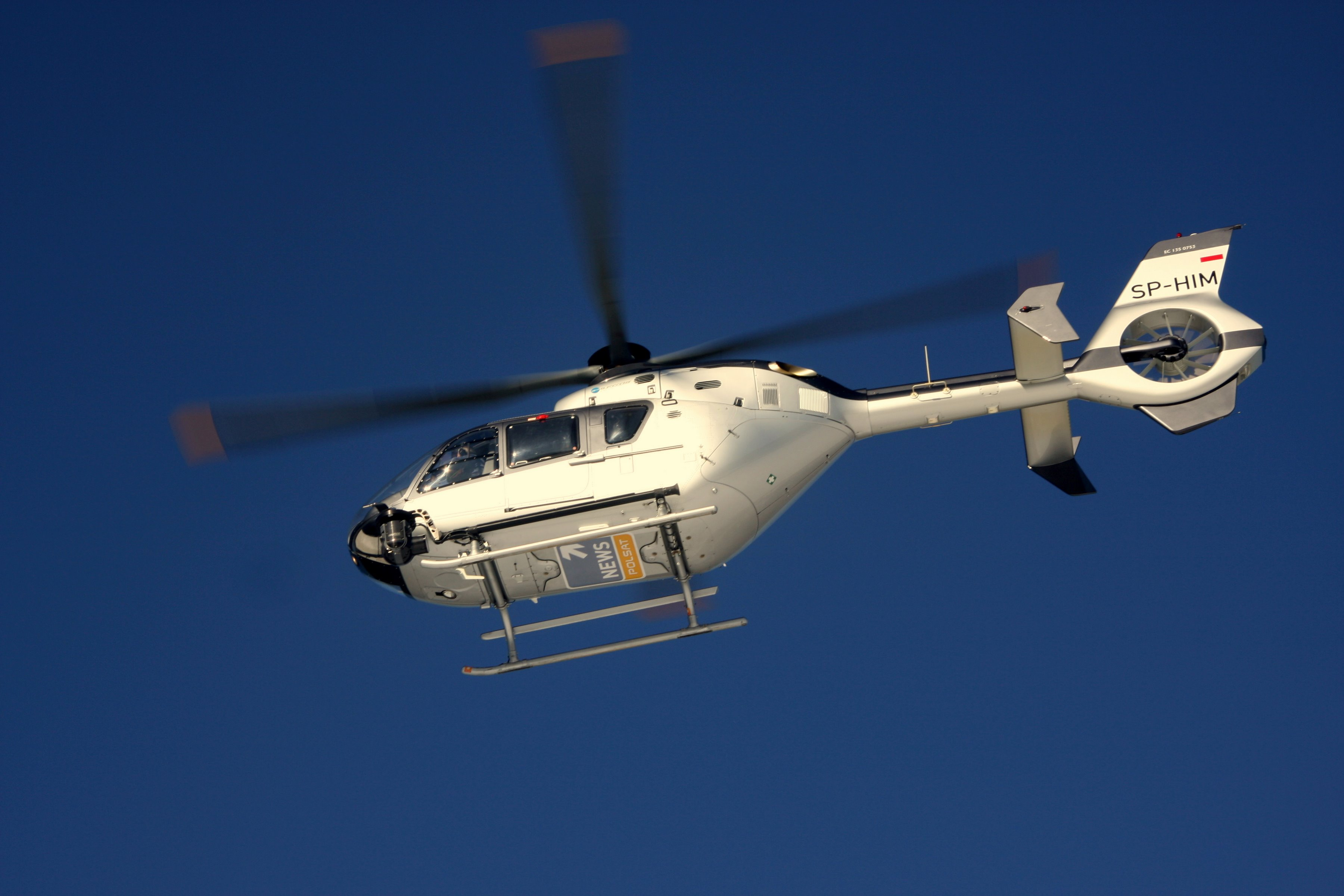 Śmigłowiec telewizji informacyjnej Polsat News.